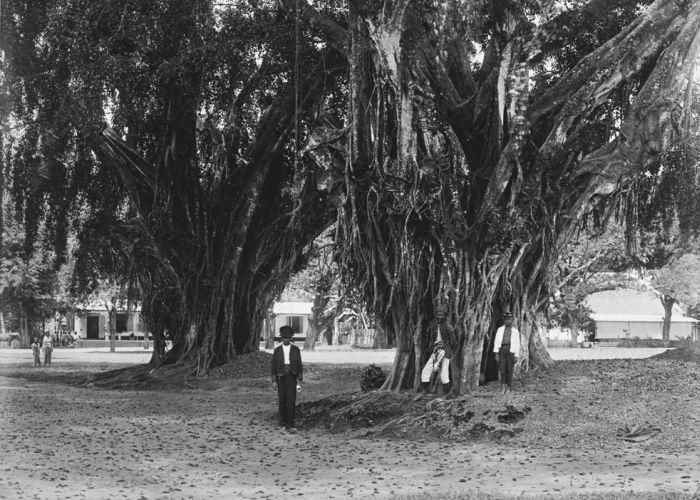 Foto. Waringinbomen op de alun-alun in Loemadjang